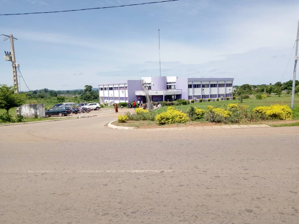 biment de la mairie de Bouaflé